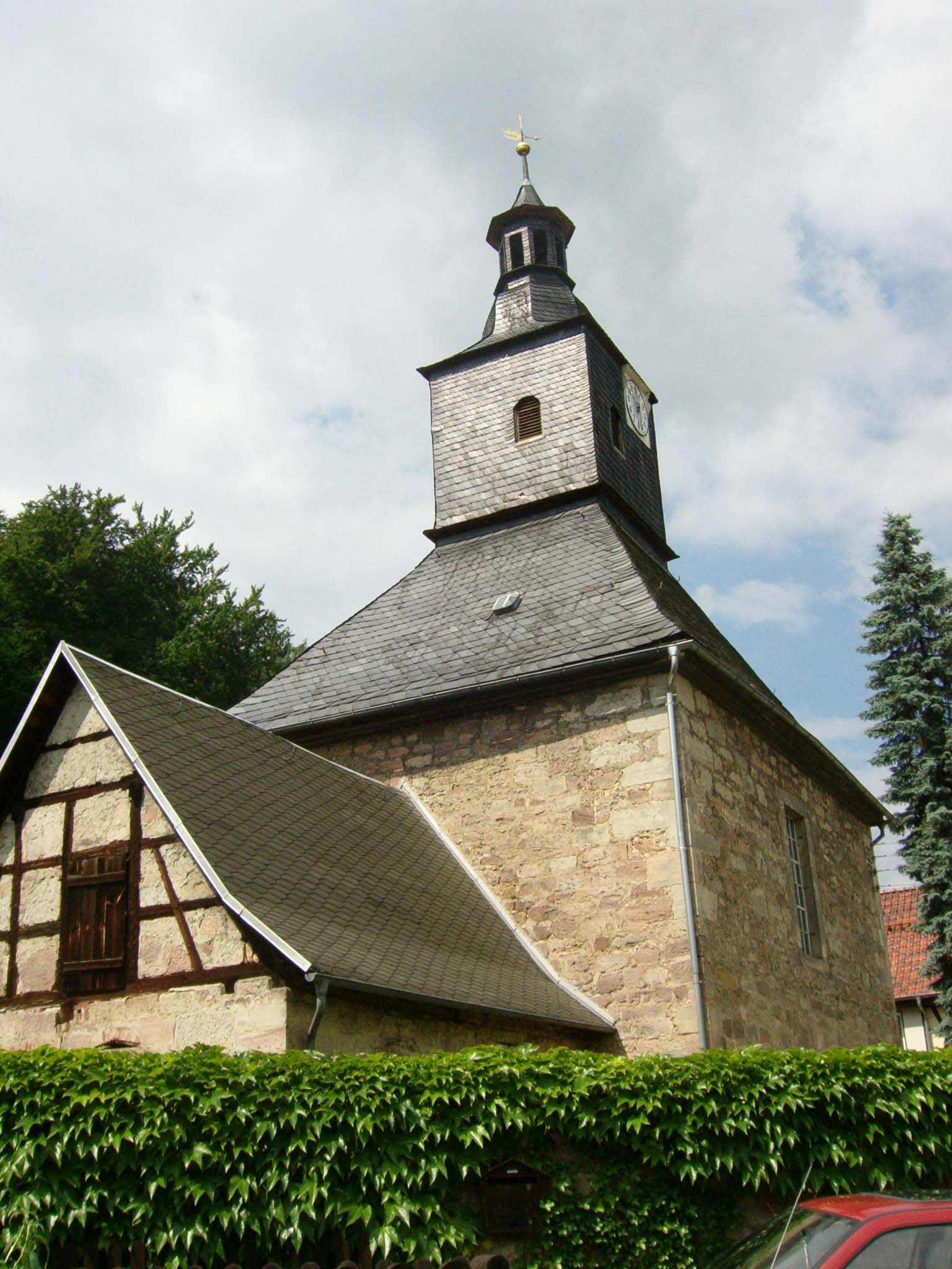 Die Kirche mit ihrem Walmdach und dem Drachenkopf als Windfahne